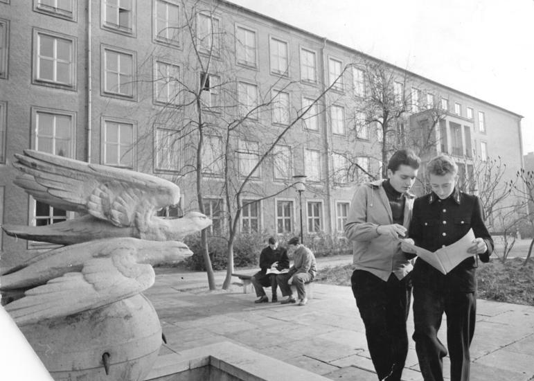 Dresden, Hochschule für Verkehrswesen Zentralbild Kohls 7.12.1959 Hochschule für Verkehrswesen in Dresden Die Hochschule für Verkehrswesen in Dresden, die im Jahre 1952 gegründet wurde, ist die einzige Spezialinstitution dieser Art in ganz Westeuropa. Im Direktstudium befinden sich zur Zeit 2226 Studenten. Es ist nicht Aufgabe der Hochschule, allgemeine Maschinen, Elektro- und Bauingenieure oder Diplom-Wissenschaftler zu entwickeln, sondern die Ausbildung richtet sich stets nach den besonderen Erfordernissen der einzelnen Zweige des Transport- und Nachrichtenwesens. Alle Erziehungs- und Ausbildungarbeit der Hochschule hat zum Ziel, Nachwuchskader für das sozialistische Transport- und Nachrichtenwesen der DDR auszubilden, die politisches Bewußtsein mit hoher fachlicher Qualifikation verbinden und unserer Arbeiter- und Bauernmacht treu ergeben sind. Die Lehr- und Forschungsarbeit wird in zwölf Richtungen, zwölf Instituten, 37 Lehrstühlen und sieben Dozenturen durchgeführt. 62 Professoren, Dozenten und Lektoren, 43 wissenschaftliche Mitarbeiter und 136 Assistenten sind z.Zt. an der Hochschule tätig. UBz: Blick auf das Hochschulgebäude an der Hettnerstrasse.